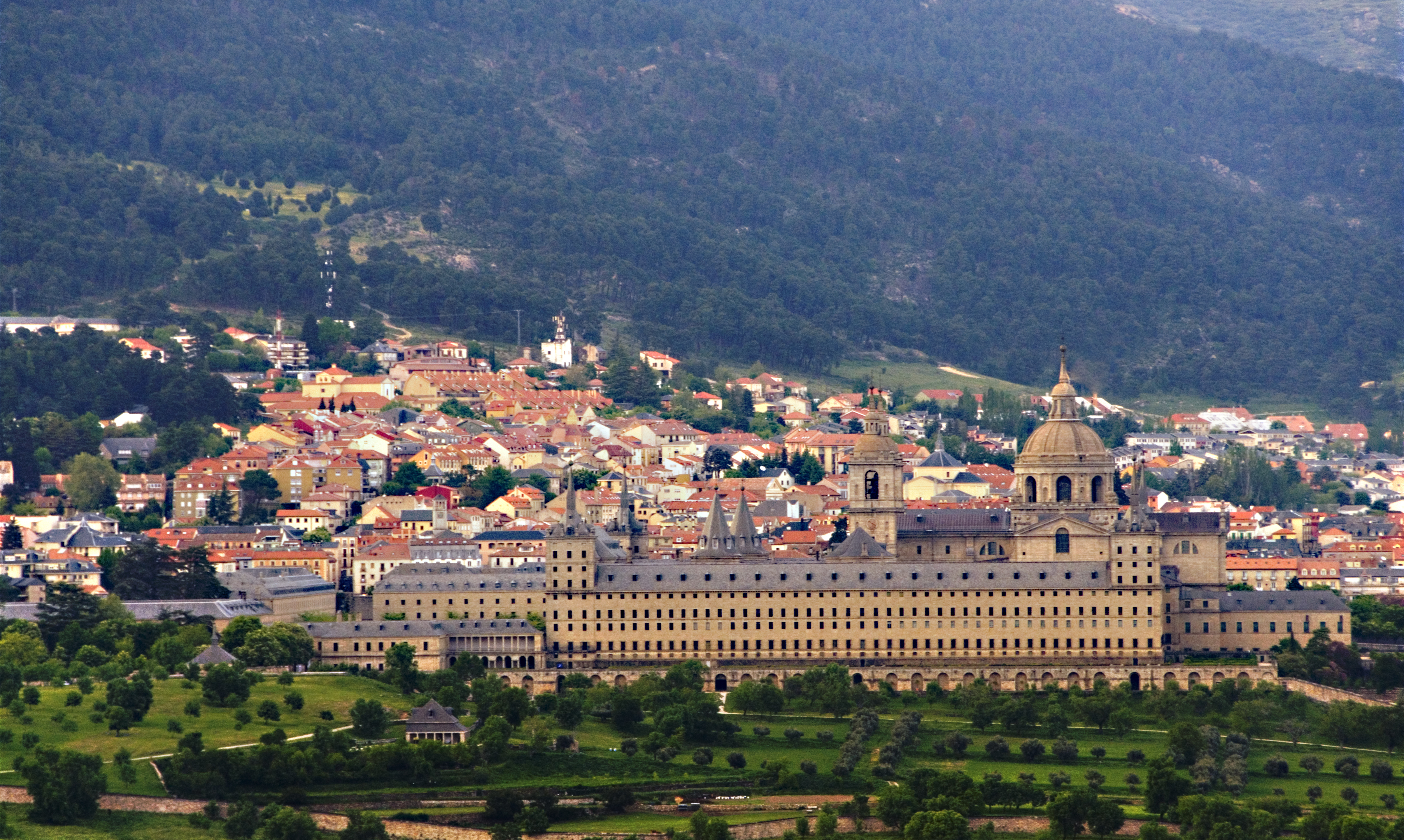 Juan de Herrera, auxiliado por Antonio de Villacastín dirigió la obra desde 1572 hasta el final (1584), y le imprimió su sello característico. Los trabajos de ornamentación, sin embargo no terminaron hasta comienzos del siglo XVII. Herrera, estudioso de las teorías del romano Vitrubio, es una de las grandes figuras de la arquitectura española de todos los tiempos e influyó decisivamente en la arquitectura española del último cuarto de siglo. Otras obras de Herrera, al margen del Escorial, serán la Lonja de Sevilla y la catedral de Valladolid. La arquitectura herreriana se basaba en el protagonismo de la pureza de la línea frente a los elementos decorativos No fue azarosa, por tanto, la inmensidad de los muros del edificio, casi desnudos y sólo interrumpidos por hileras de ventanas. Los torreones de las esquinas añaden un sentido militar a la construcción. Estas torres se rematan en chapiteles a cuatro aguas, con pizarra negra, que repiten el contraste cromático con la piedra. La decoración arquitectónica se basa en columnas jónicas y dóricas y frontones triangulares, además de pináculos con bolas. En el exterior destacan El Jardín de los Frailes y la Galería de convalecientes. Felipe II era un gran amante de la naturaleza por lo que el Jardín de los Frailes es un amplio espacio ajardinado, en el que se diseñó una docena de verdes parterres en torno a igual número de pequeños estanques de cuyo centro surge una fuente de sonoras aguas. Estos jardines, en su extremo más septentrional, están coronados por una de las realizaciones arquitectónicas más bellas, la Galería de Convalecientes, situada entre la Enfermería y la Torre de la Botica, está configurada sobre un conjunto de columnas dóricas que forman un ángulo recto. (wikipedia y